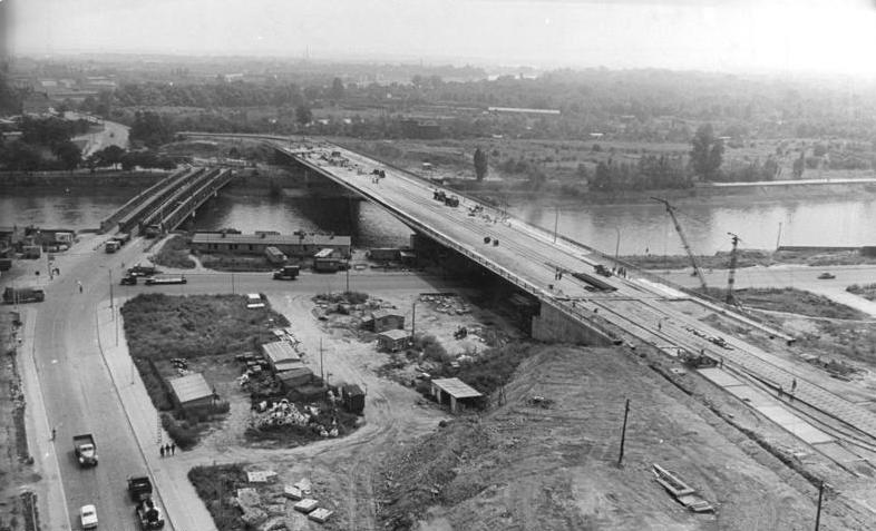 Magdeburg, Behelsbrücke, Neue Elbebrücke Zentralbild Biscan 27.7.1965 Der Bau der neuen Elbebrücke geht seinem Ende entgegen. Unser Bild zeigt einen Blick auf die Baustelle und die alte Behelfsbrücke (links im Bild), die nach 1945 errichtet wurde. Nach Fertigstellung der neuen Brücke wird sie abgetragen. Mit ihrer Länge von 2600 Metern und ihrer freien Stützweite von 130 Metern wird die neue Brücke die größte bisher in der DDR gebaute Brücke in Hohlkastenträger-Bauweise. Am 7. Oktober 1965, am Tag der Republik, soll sie dem Verkehr übergeben werden.